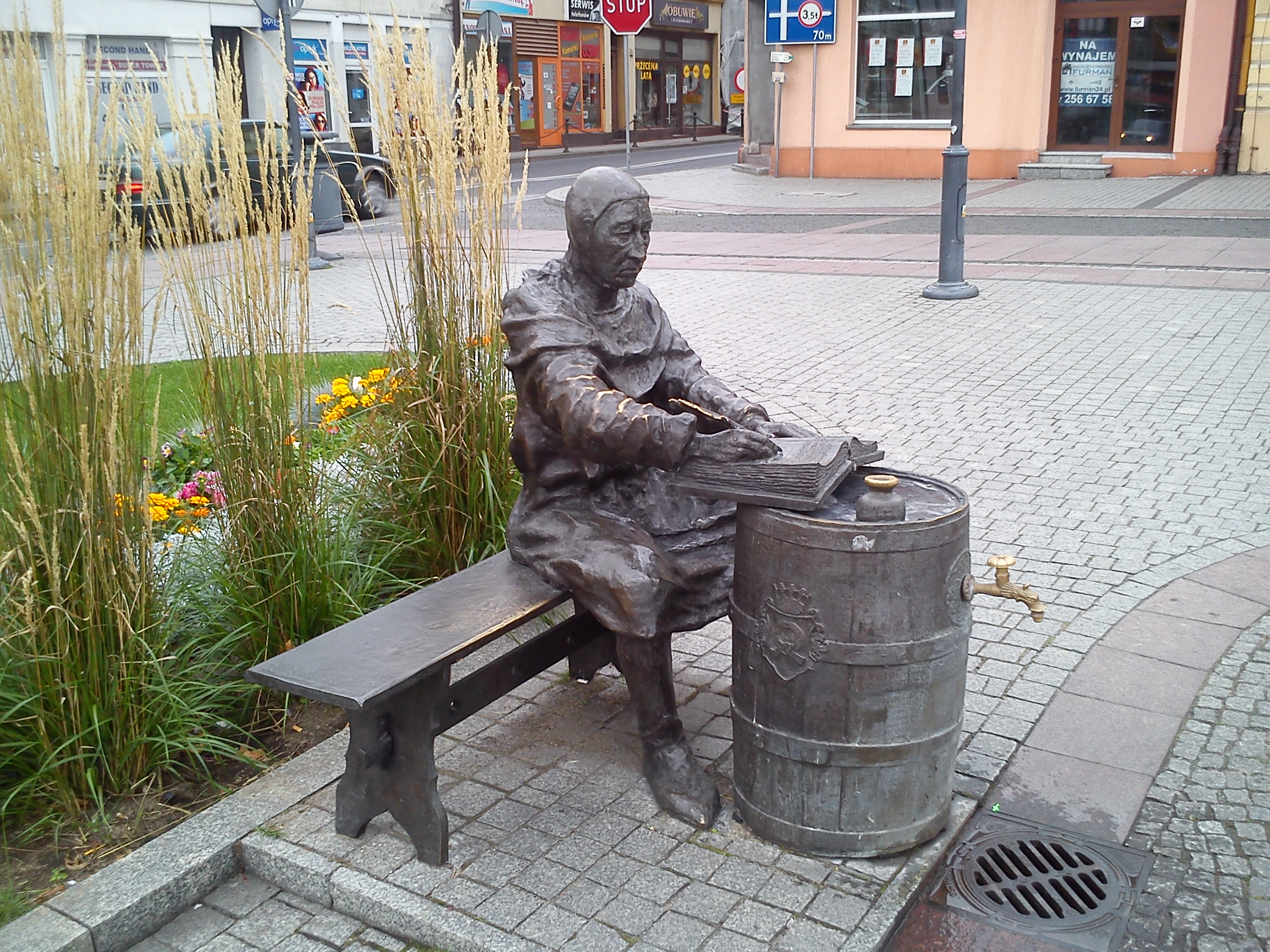 Ławeczka Janka z Czarnkowa na Placu Wolności w Czarnkowie